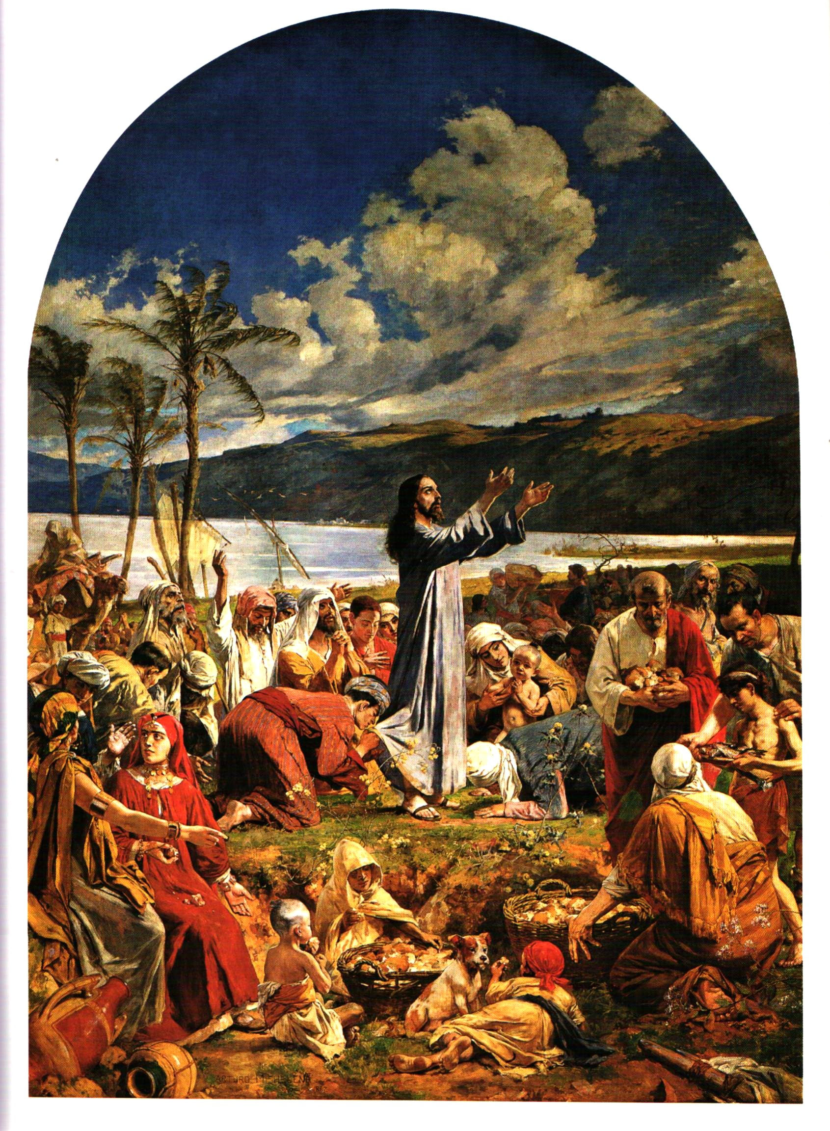 La multiplicacion de los panes y peces. 1897. Oleo sobre tela. 480 x 358 cm. Santa capilla de Caracas, 1897.